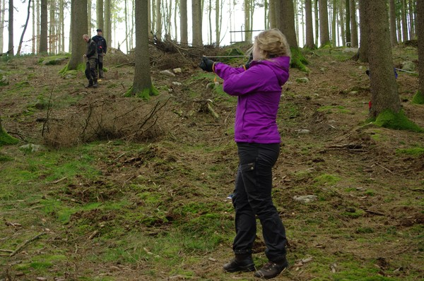 Jägmästarstudenter mäter virkesförrådet i ett gödslingsförsök. foto: Hilda Mikaelsson